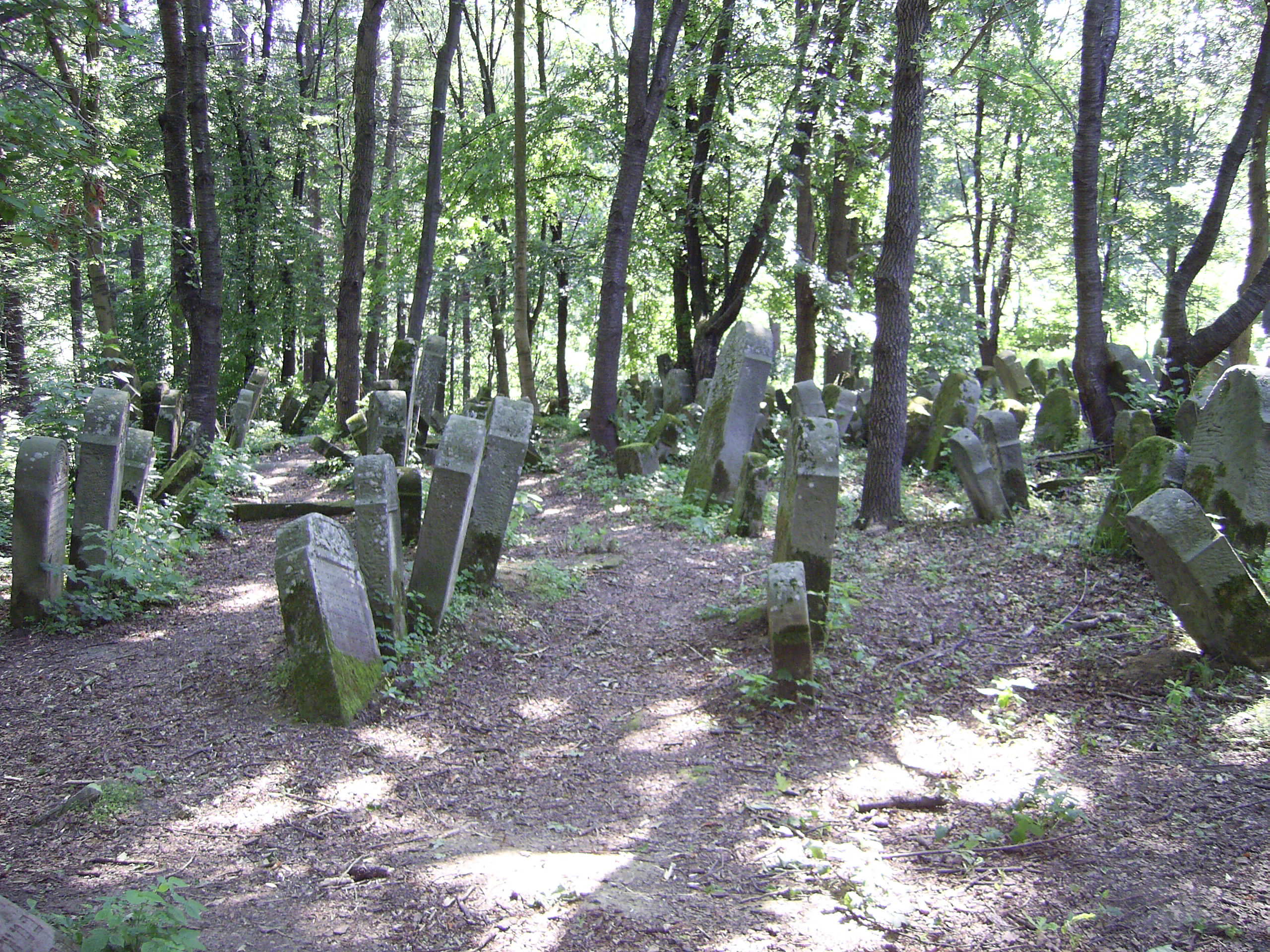 Cmentarz żydowski w Lesku